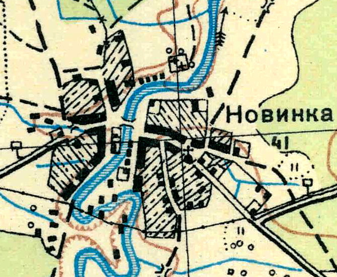 Топографическая карта Ленинградской области, квадрат О-36-25-Б-г (Озерешна), деревня Новинка